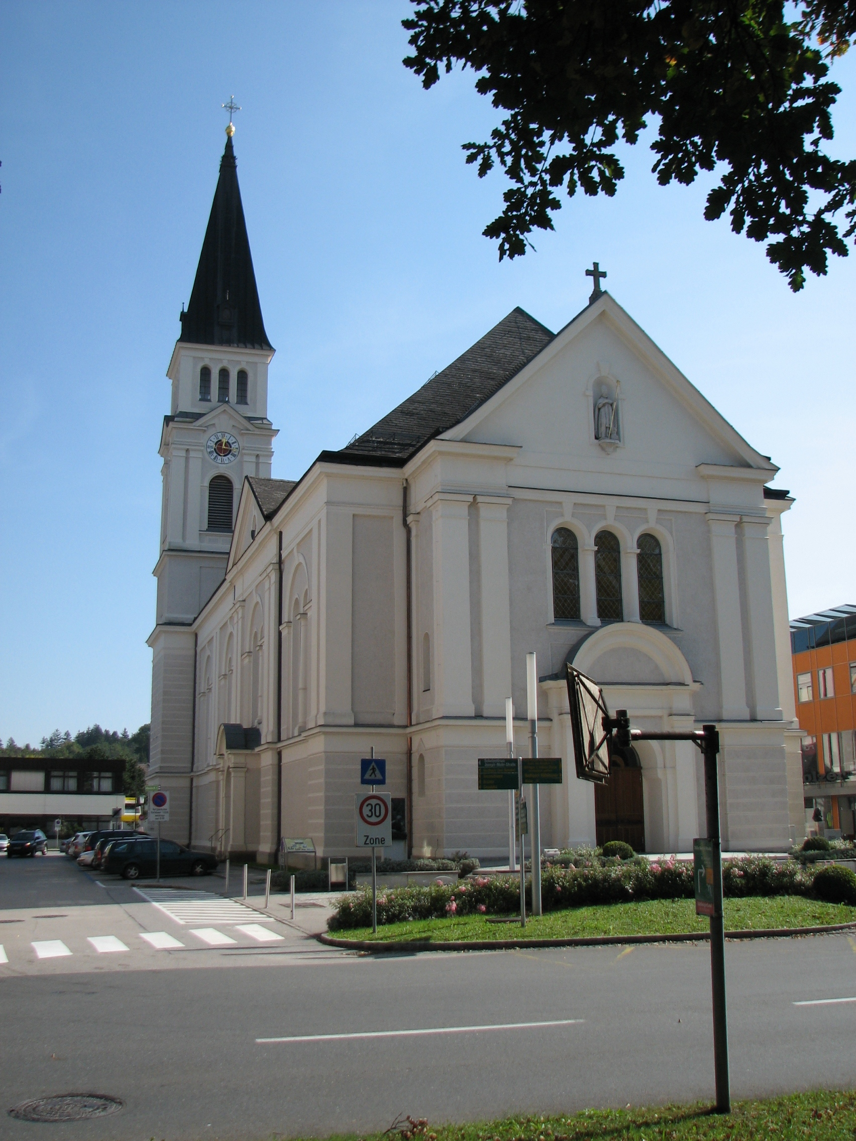 Kath. Pfarrkirche hl. Nikolaus